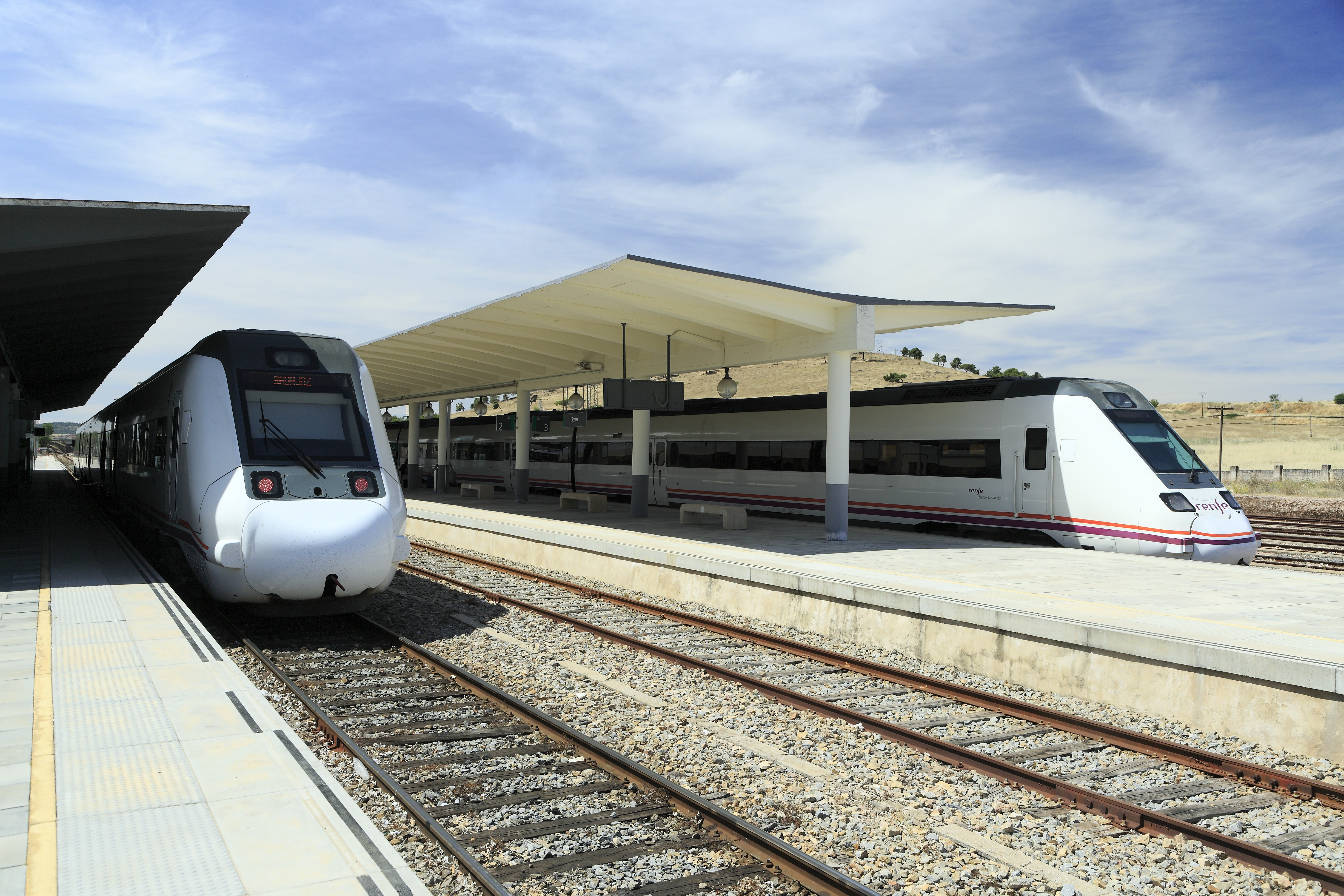 Knotenpunkt mit Strecken in drei Richtungen, Madrid, Mérida und Valencia de Alcántara, deshalb gibt es drei Bahnsteigkanten. Der Zug der Reihe 599 links auf Gleis 1 kommt von Madrid und verlässt Cáceres nach Mérida und Badajoz, der der Reihe 598 rechts auf Gleis 3 fährt nach Valencia de Alcántara.